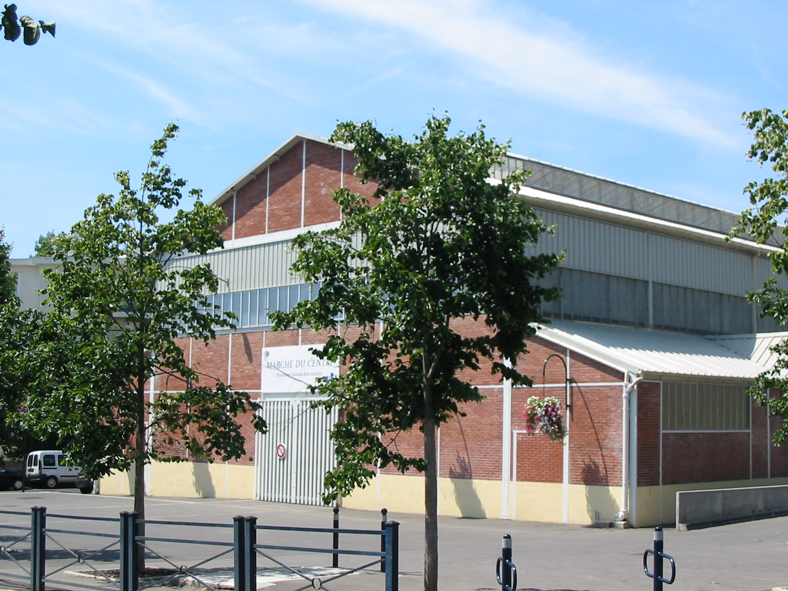 Le marché du centre à Brunoy (Essonne).